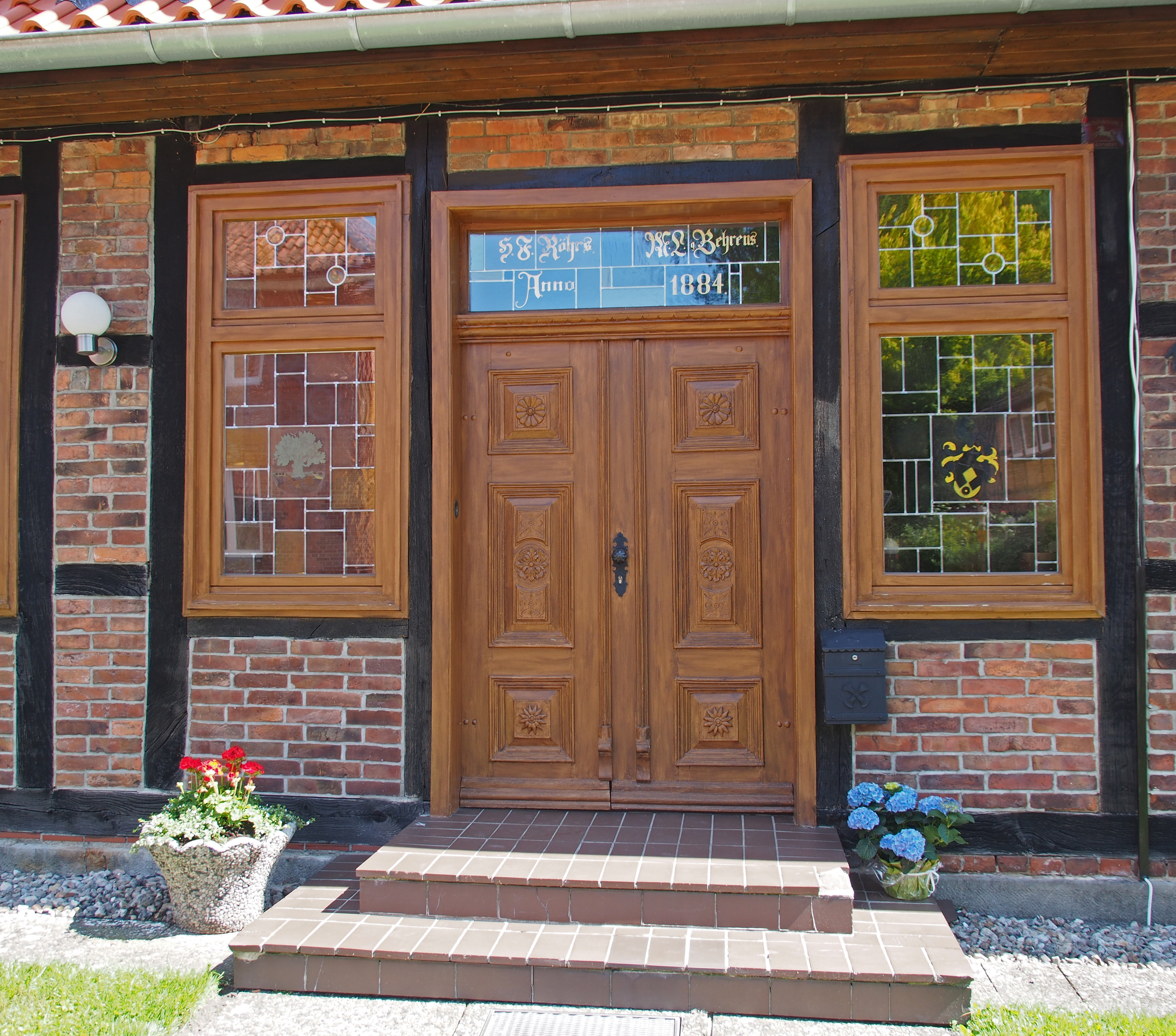 Haustür eines Bauernhaus in Eversen, Stadt Bergen (Niedersachsen)